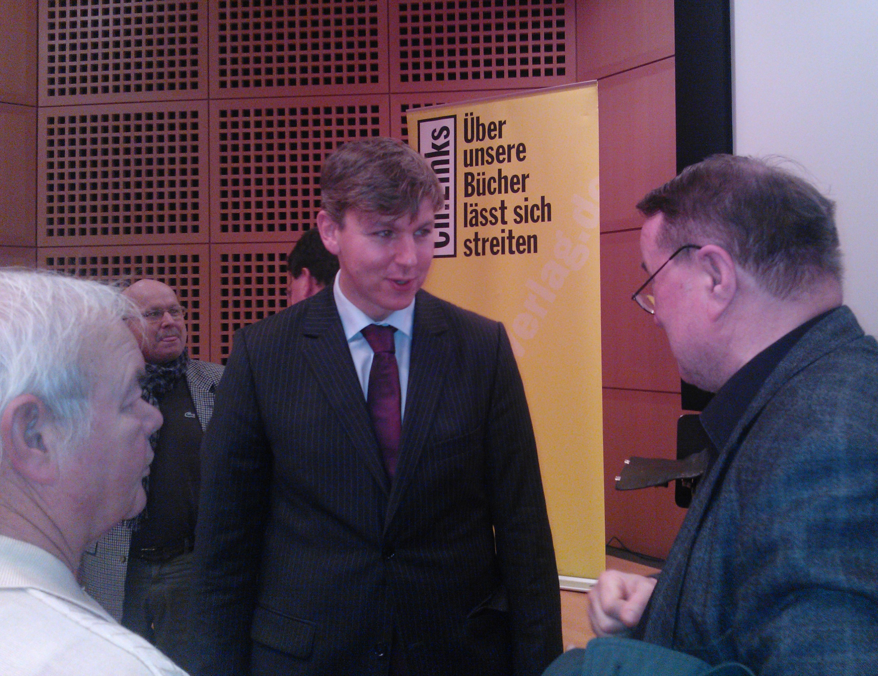 Pahl (Mitte) im intellektuellen Diskurs mit Gästen seiner Buchpräsentation "Fremde Heere Ost" am 13. November 2012 im Deutschen Historischen Museum Berlin